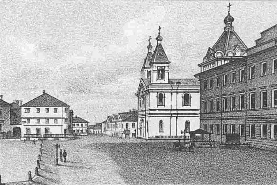 Беларуская (тарашкевіца): Менск (Miensk), Высокі Рынак (Vysoki Rynak). Царква Сьвятога Духа і манастыр базылянаў па першай маскоўскай перабудове